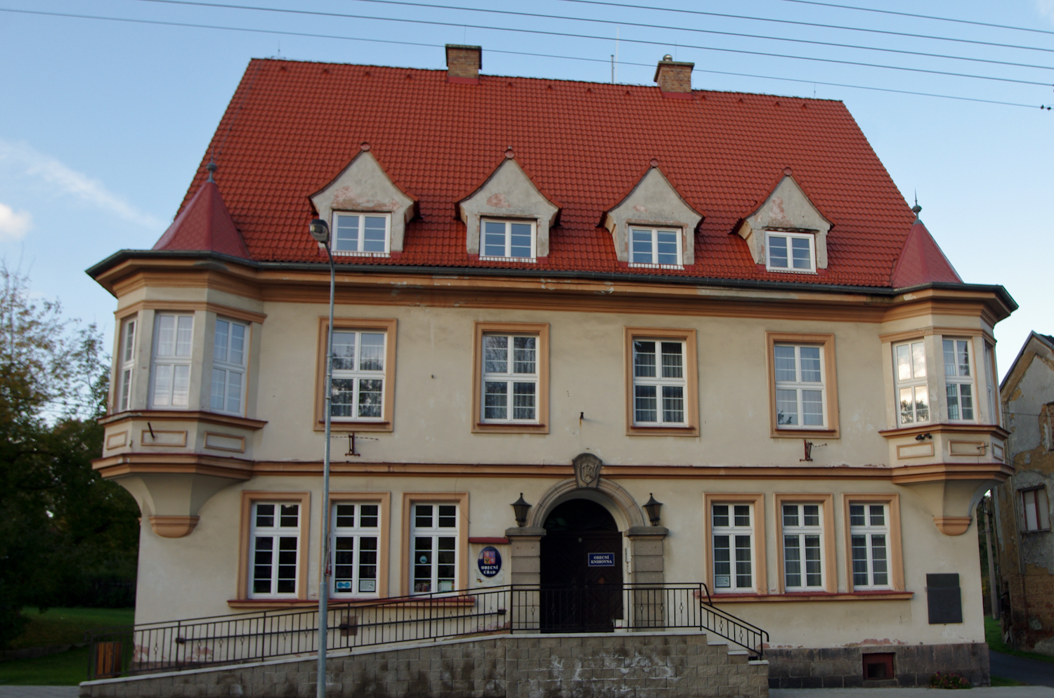 Krajková, okres Sokolov, Obecní úřad s pamětní deskou zastřelených četníků; více